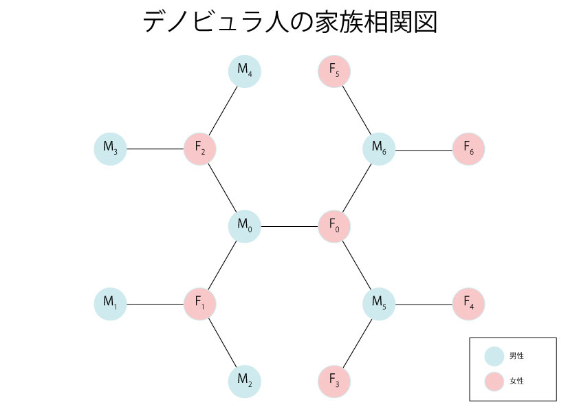 スタートレック：エンタープライズに登場するデノビュラ人の家族の相関図